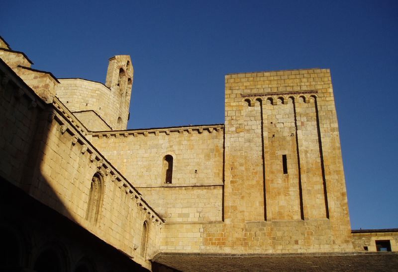 Lateral de la Catedral de la Seo de Urgel, España